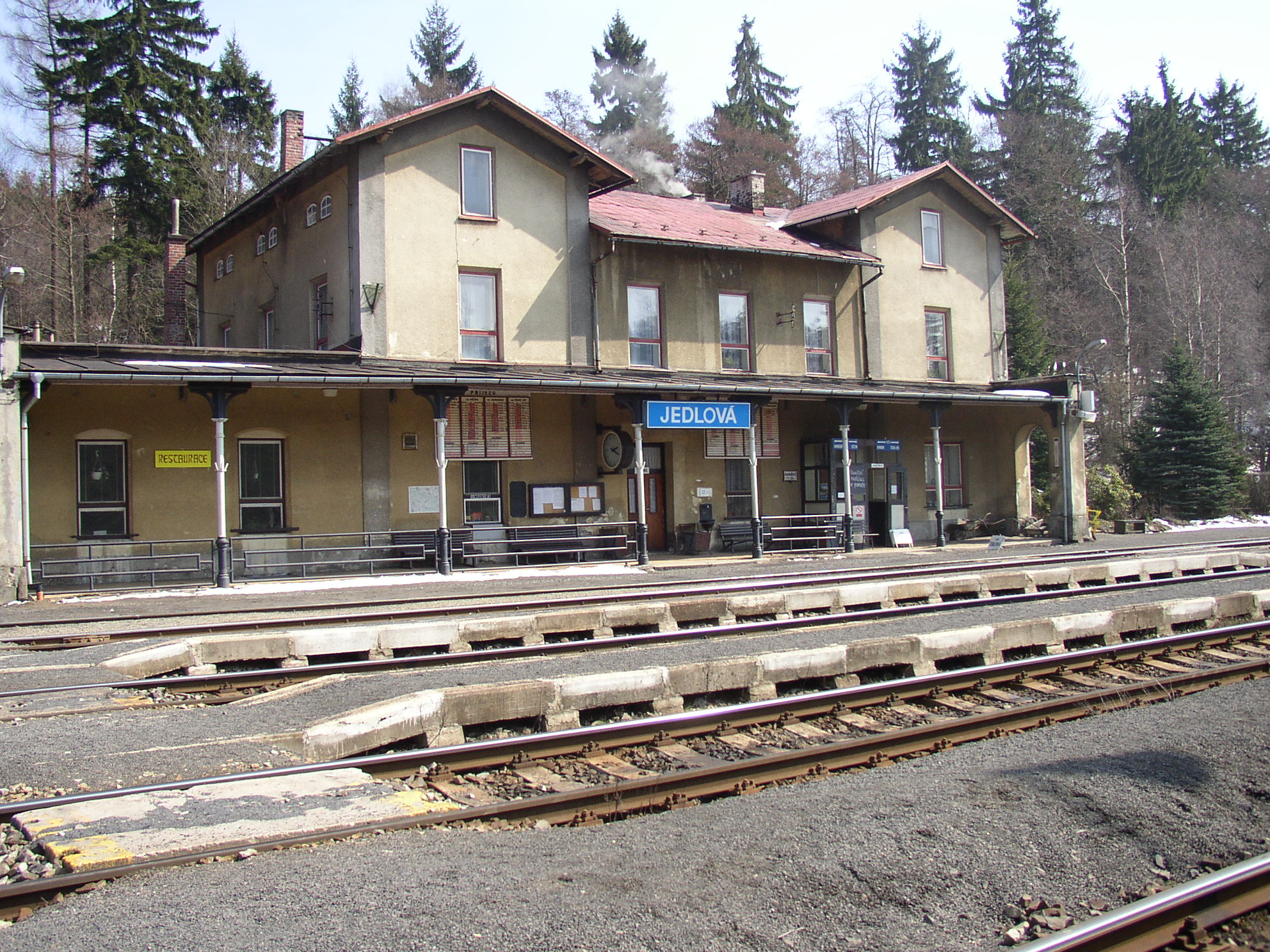 Nádraží jedlová, Česká republika